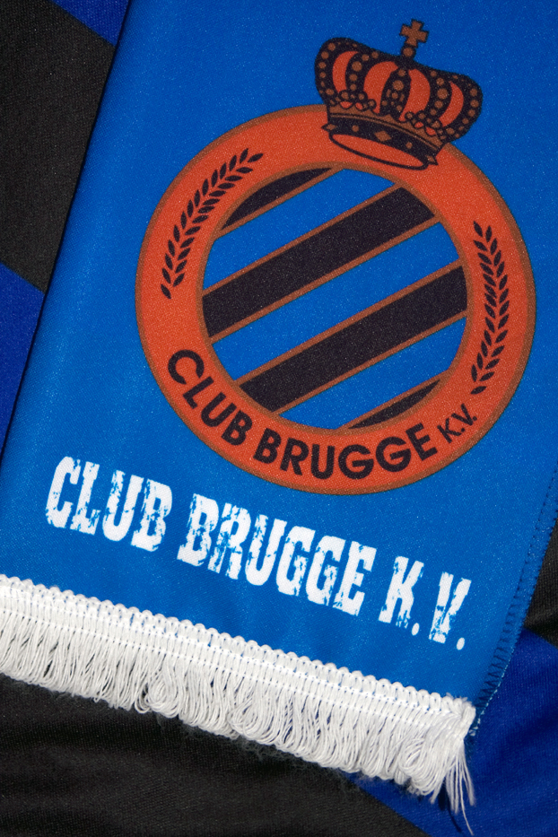 Sjaal Club Brugge KV